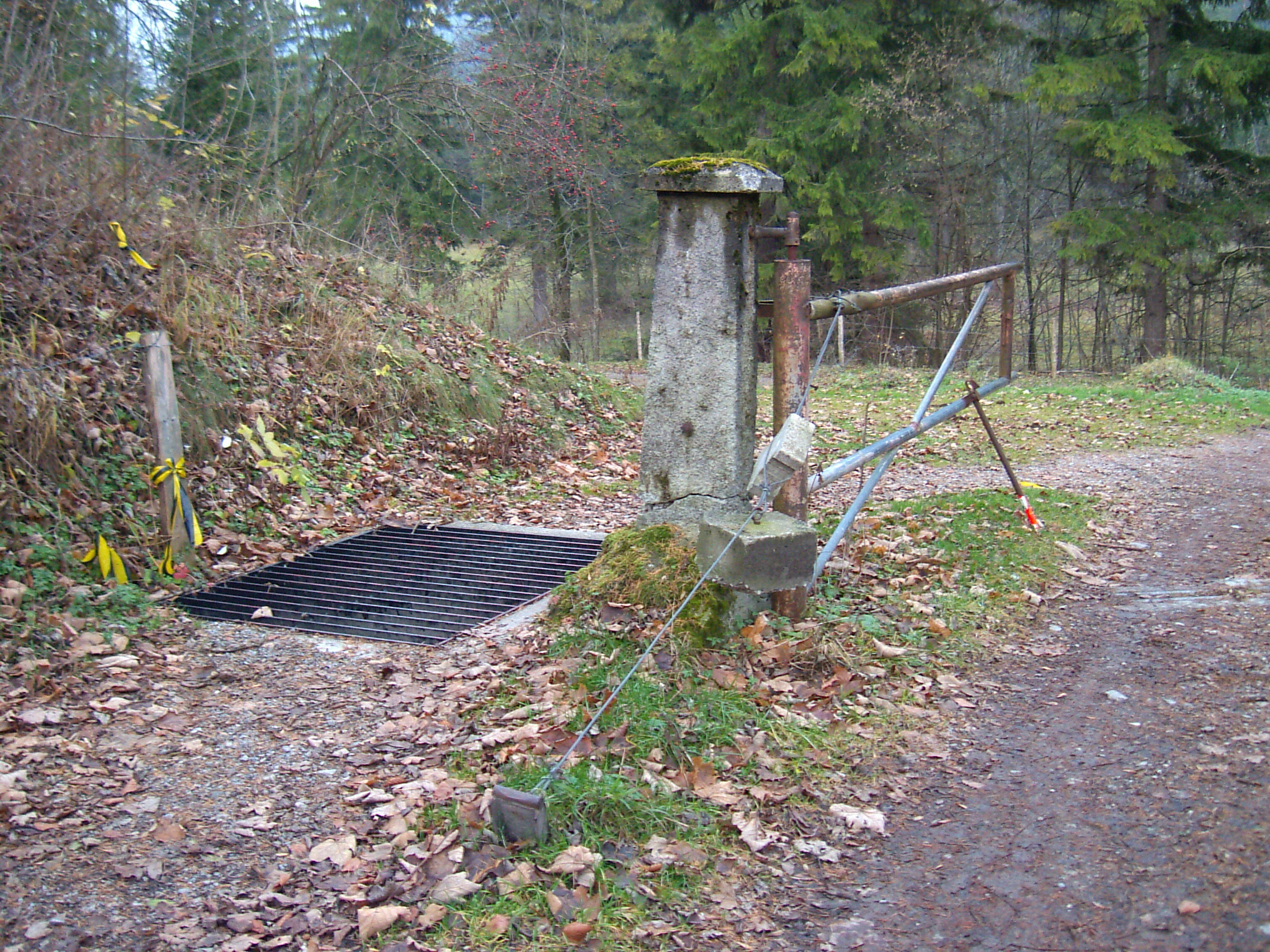 Selbstschließendes Viehgatter mit Gewichten. Links ein Weiderost für Fußgänger und Radfahrer.